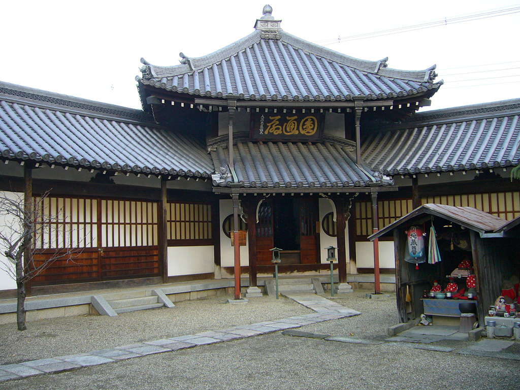 Dai-nenbutsu-ji in Osaka, Japan